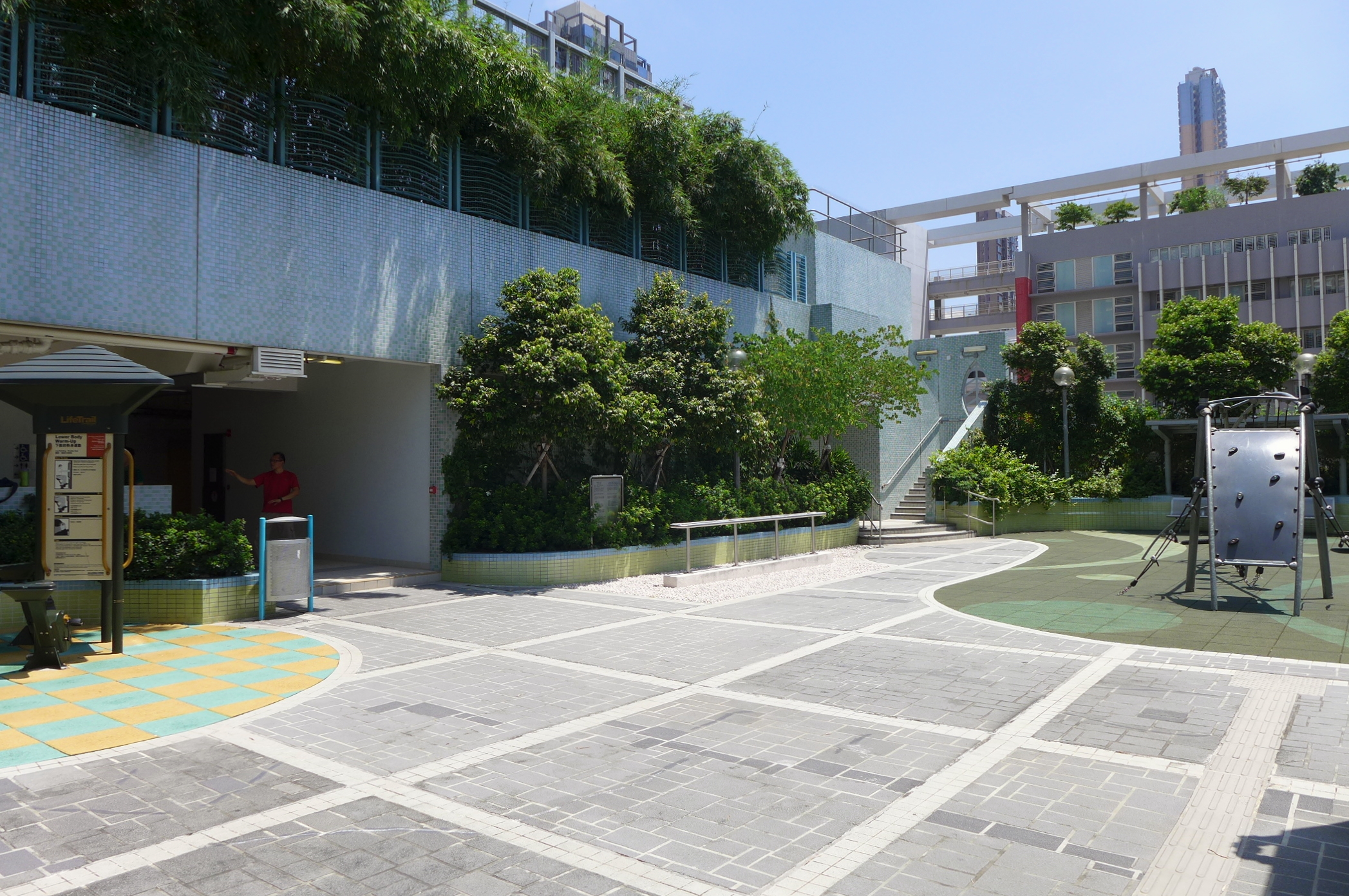 Un Chau Estate Phase 5 Un Him House Podium